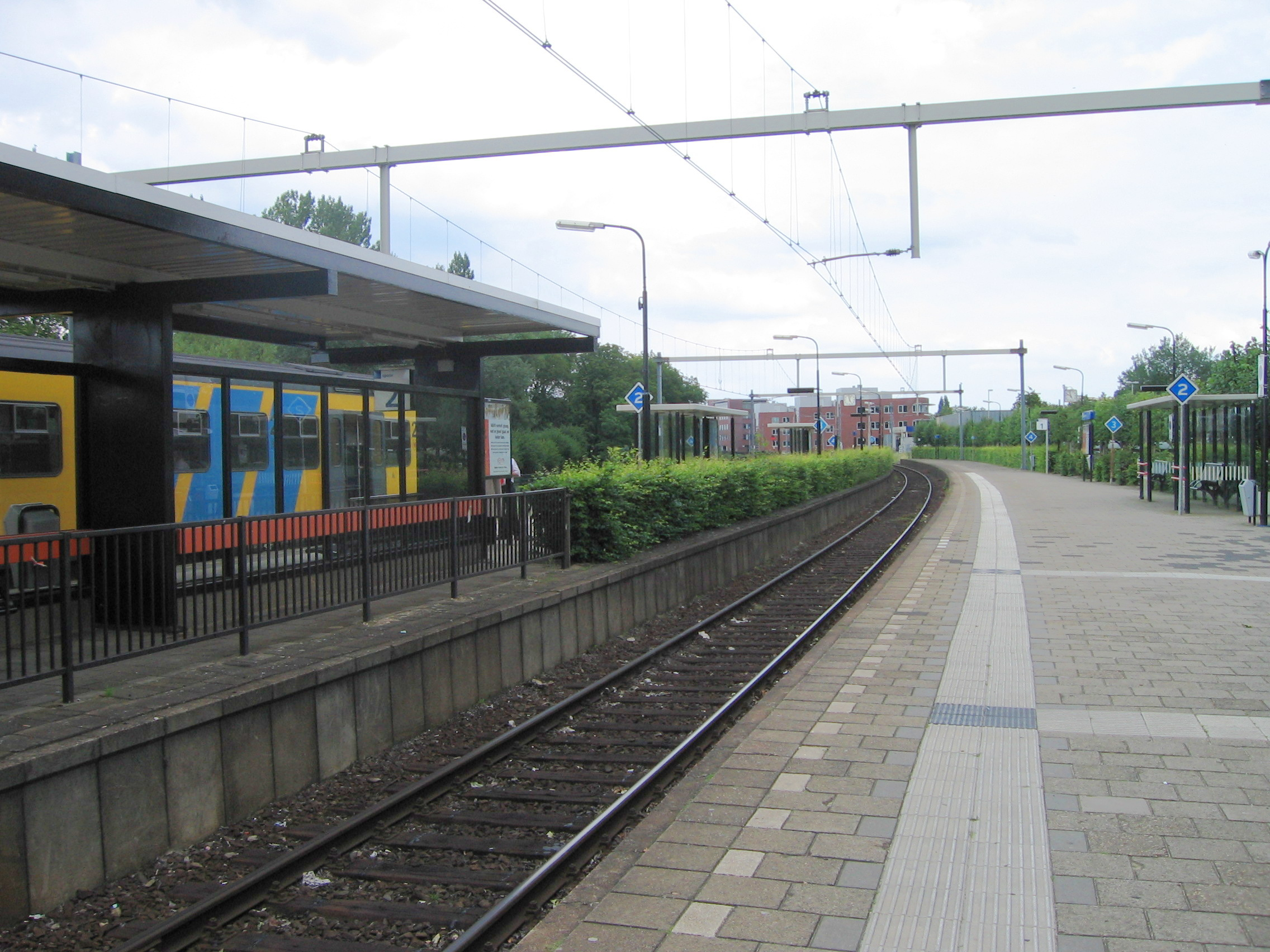 De perrons van station Gorinchem.